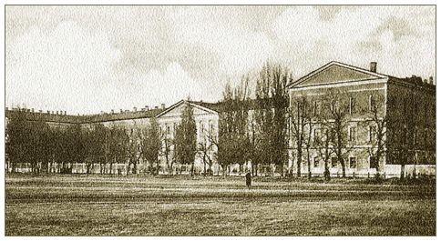 Воронеж, Михайловский кадетский корпус